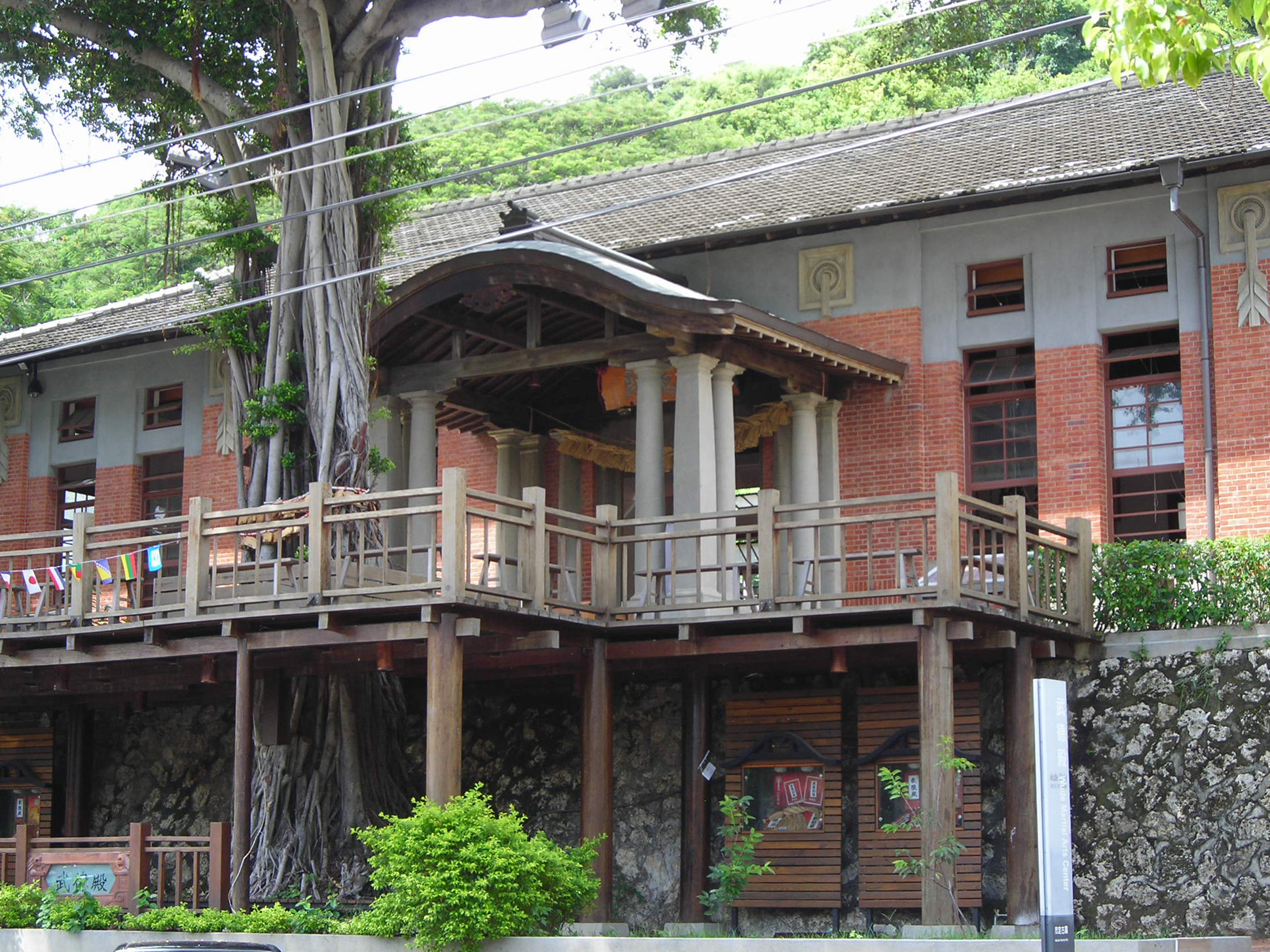 高雄市武德殿，現今的樣貌